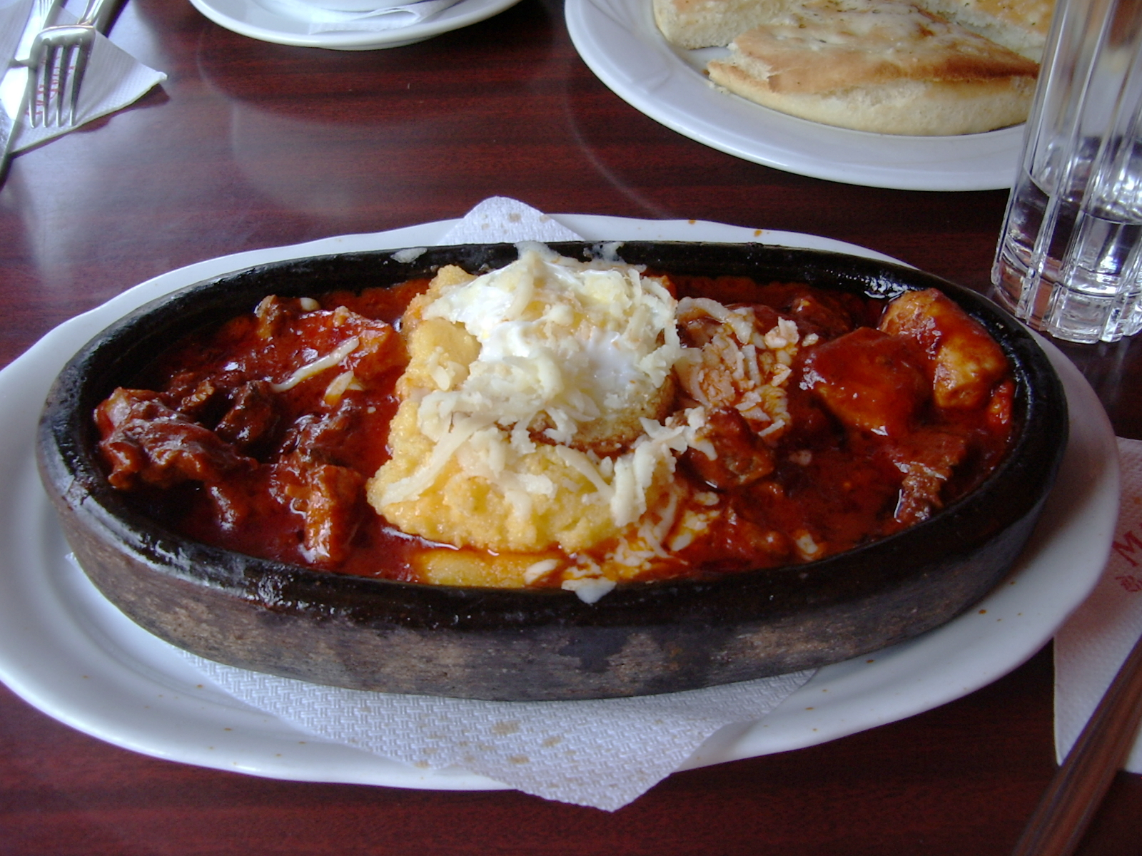 Tocană (rôti de porc) et mămăligă (polenta), plat roumain